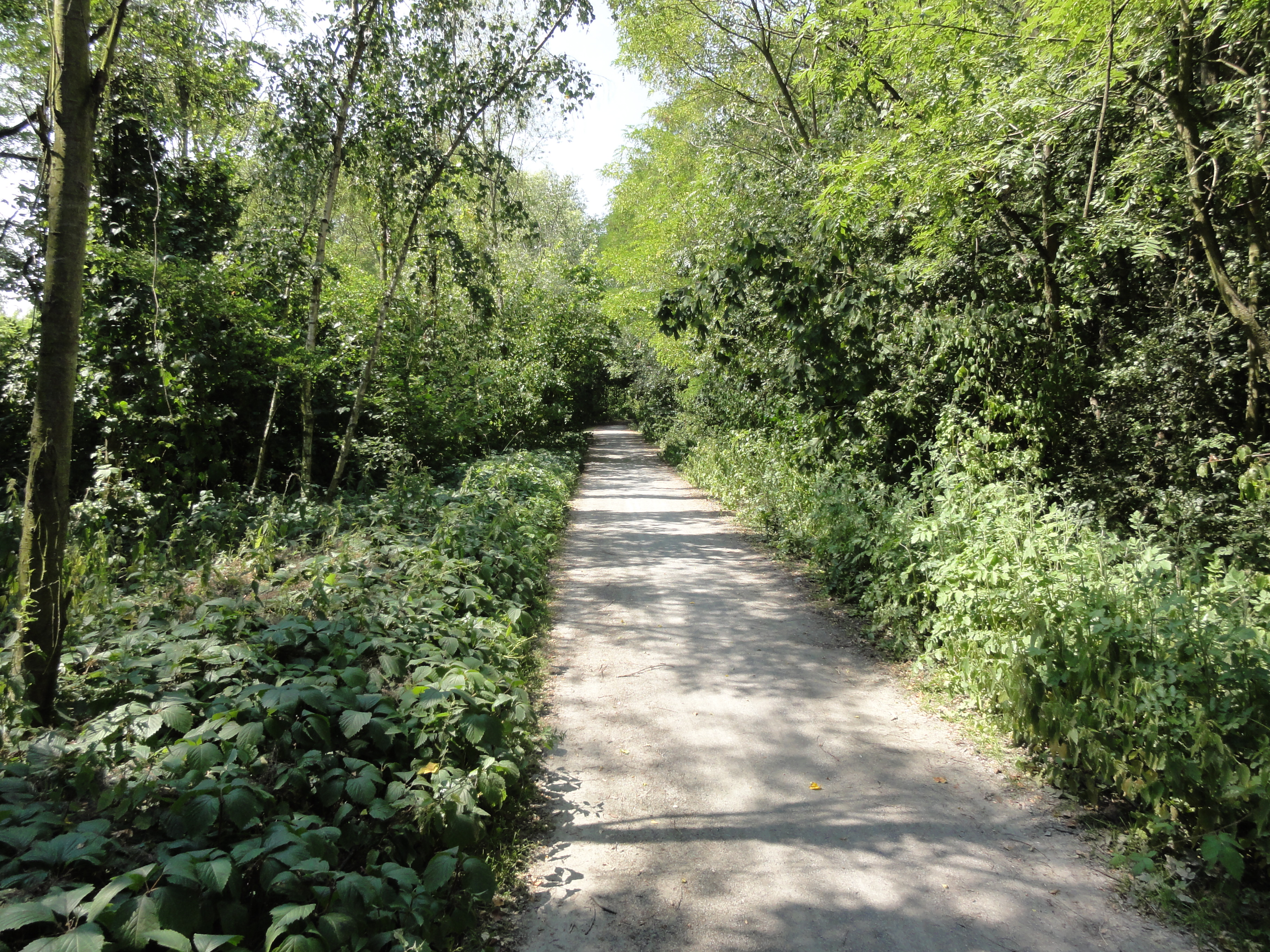 Terril n° 213B dit Cavalier de Roost-Warendin, Compagnie des mines de l'Escarpelle, Auby, Nord, Nord-Pas-de-Calais, France.